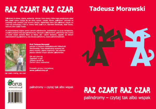 Okładka książki "Raz czart raz czar" (2009) Tadeusza Morawskiego